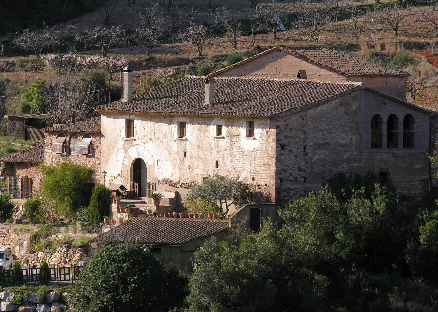 Can Bayona de Corbera de Llobregat (Barcelona, Espanya)